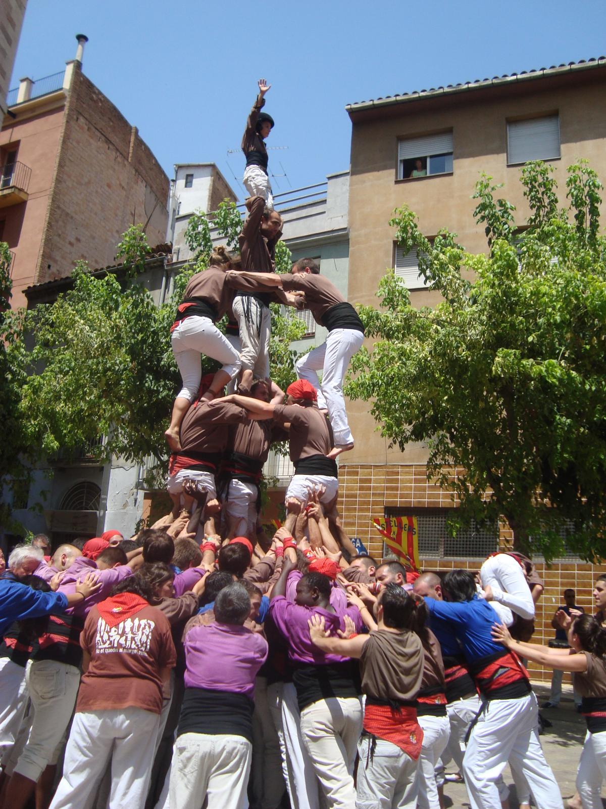 3 de 6 amb agulla dels Margeners de Guissona. Data 2011-07-10 . Lloc: Igualada- Plaça Pius XII. Motiu: Actuació Aniversari Cal Tabola.